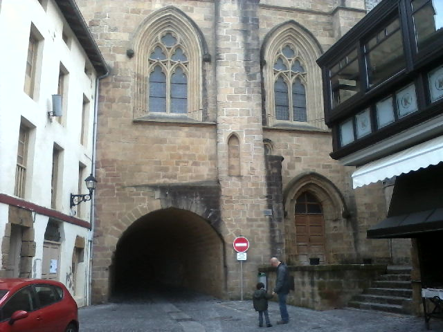 Es un pasadizo que da la entrada al pueblo pesquero y que pasa por debajo de la Iglesia...